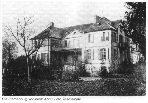 Sternenburg in Poppelsdorf, abgerissen 1908